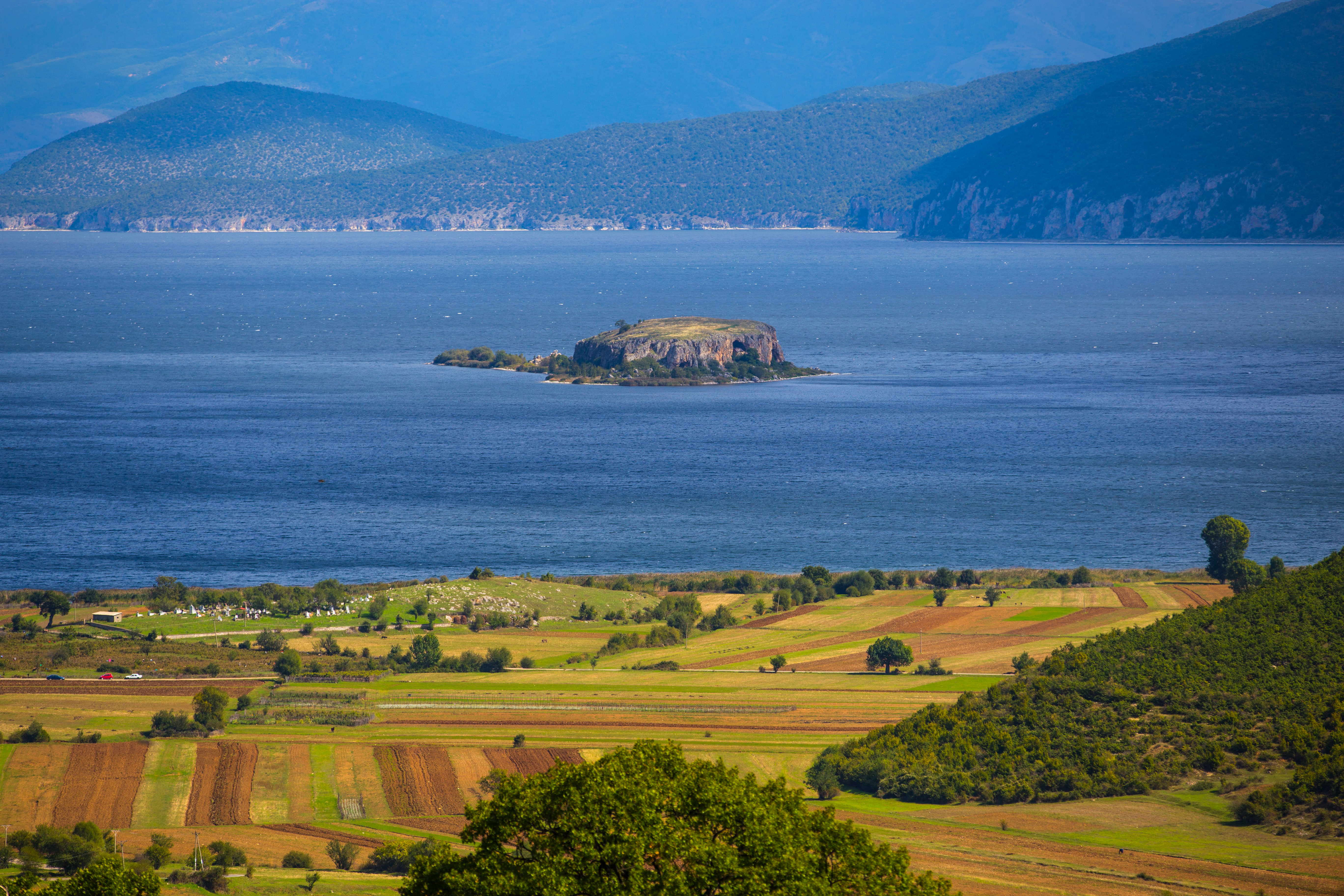 Liqeni i Prespave, Korce, Devoll